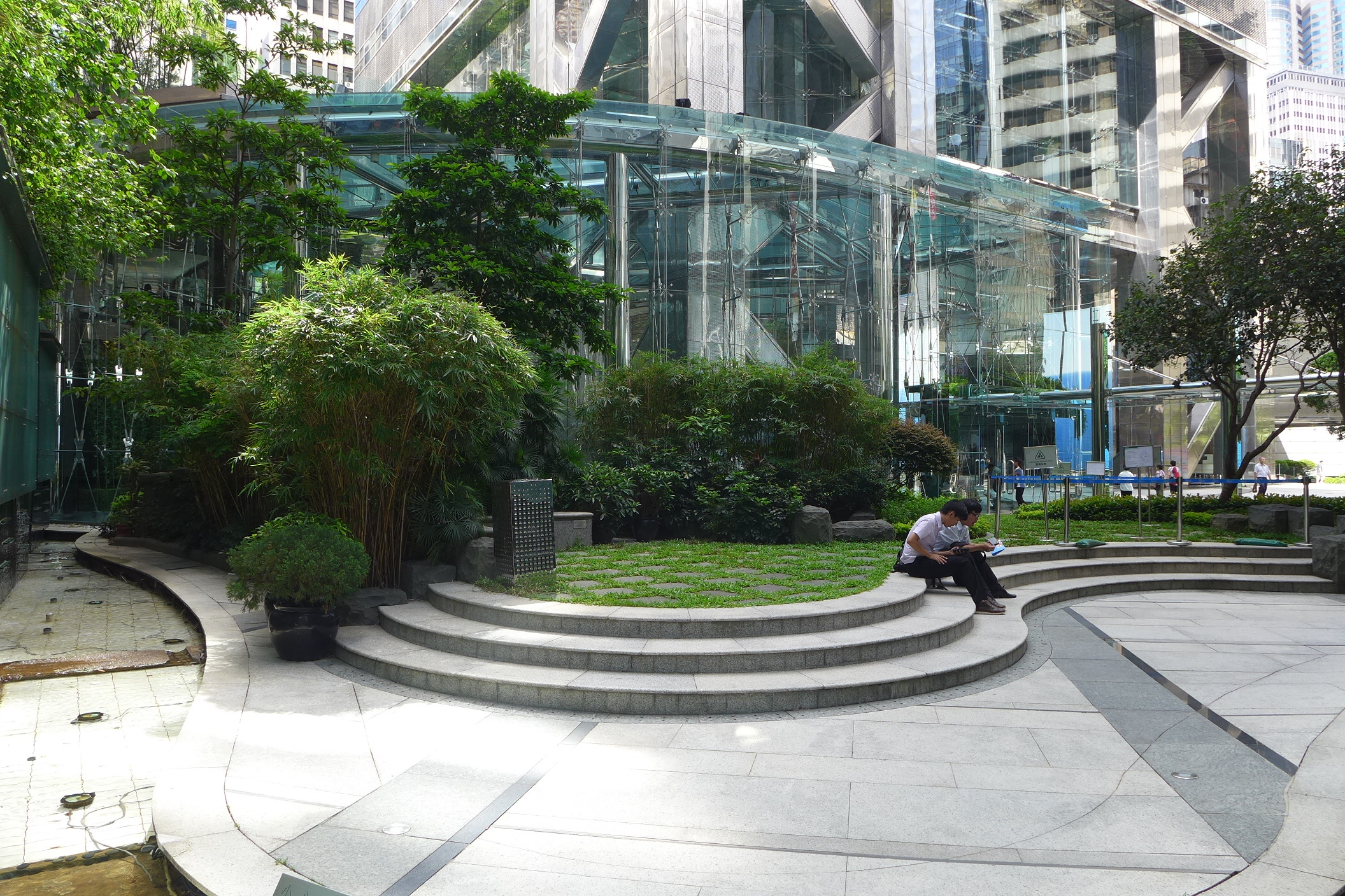 The Center Cheung Fat Garden